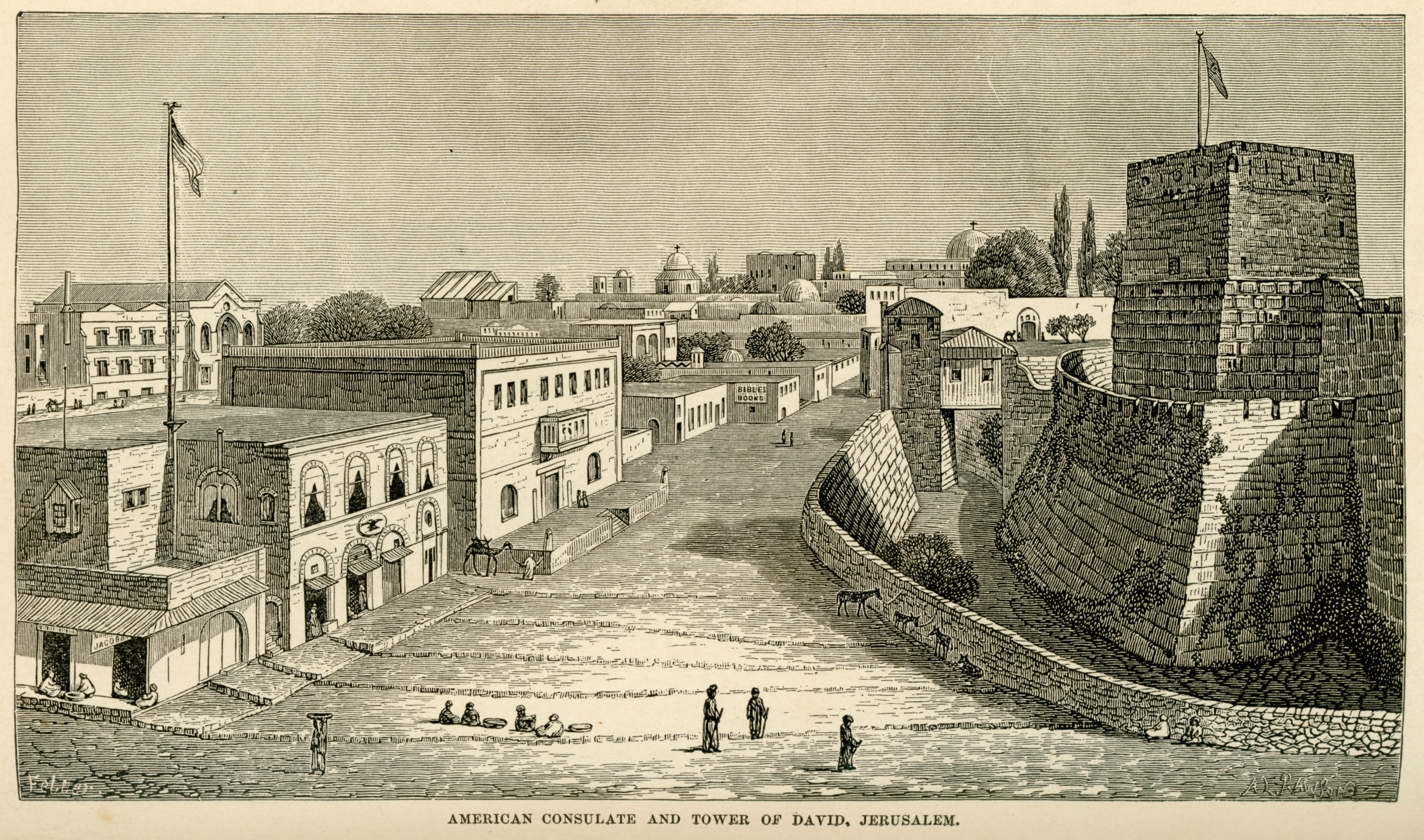 המבנה הראשון של הקונסוליה האמריקאית בירושלים, סביבות 1857